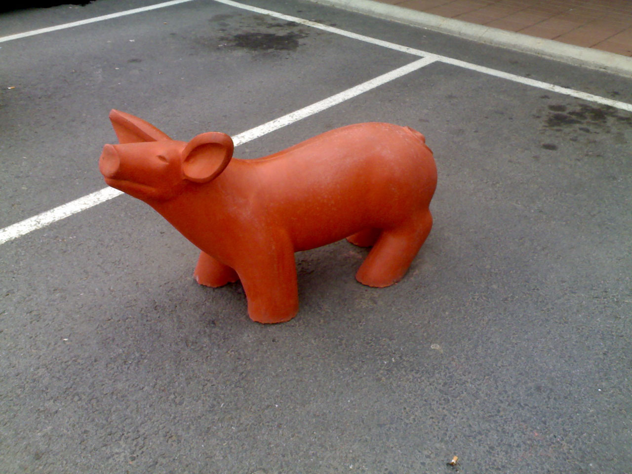 Betoniporsas (Concrete pig)